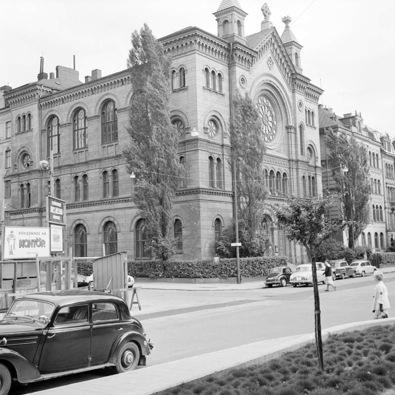 Florakyrkan, senare Betesdakyrkan. Floragatan 8. Arkitekt Anders Gustaf Forsberg. Byggnadsår 1884-85